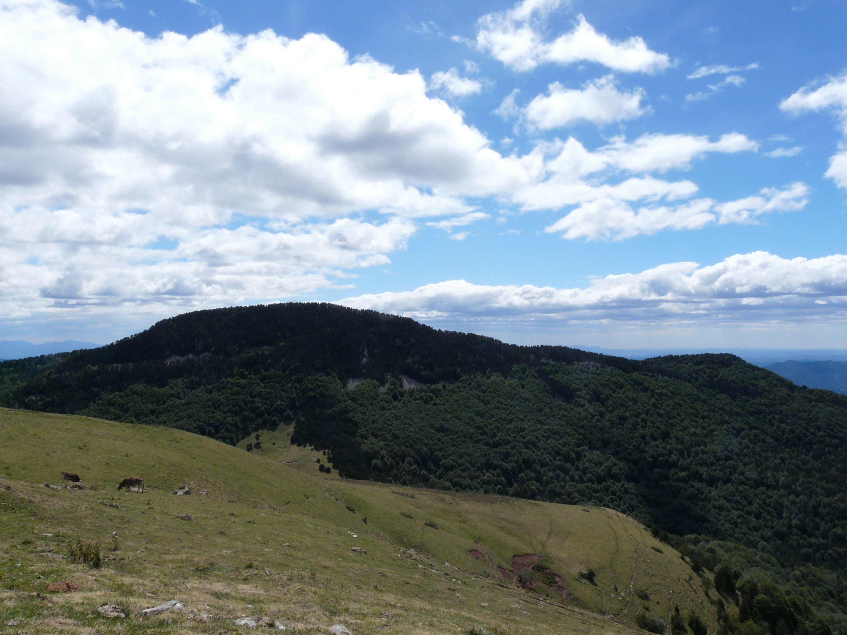 Serra Cavallera (Ripollès) (Ogassa, Pardines, Ribes de Freser i altres). This is a a photo of a natural area in Catalonia, Spain, with id: ES510174 Object location42° 16′ 48″ N, 2° 13′ 48″ E